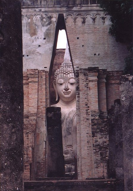 Sukhothai Historical Park, Thailand Andere Versionen